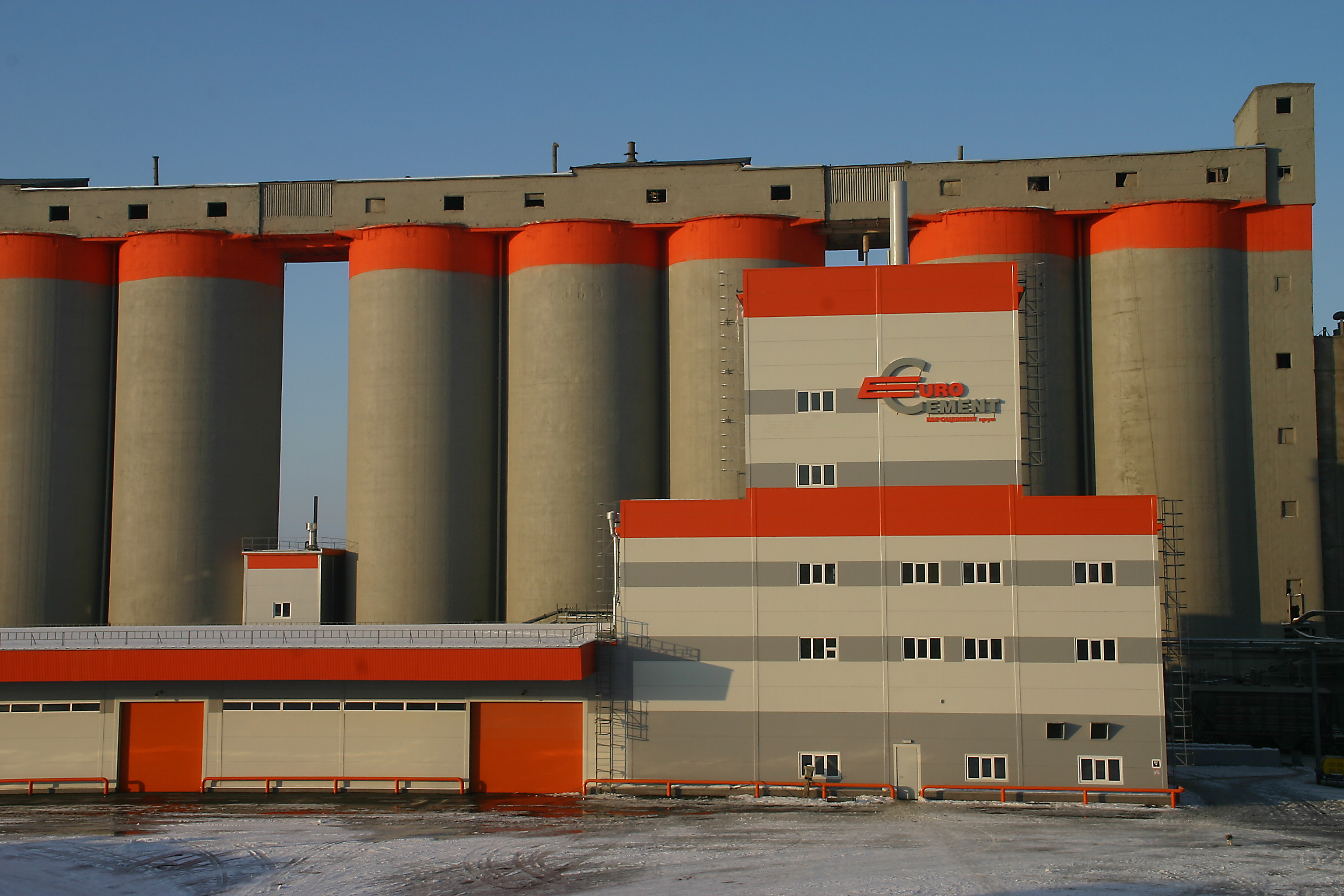 Завод "Липецкцемент"